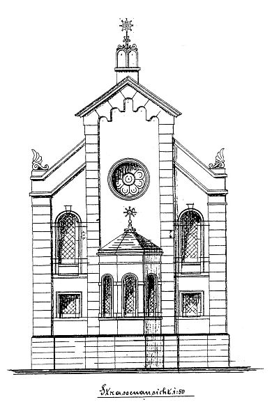 Architekturzeichnung der Synagoge in St. Wendel